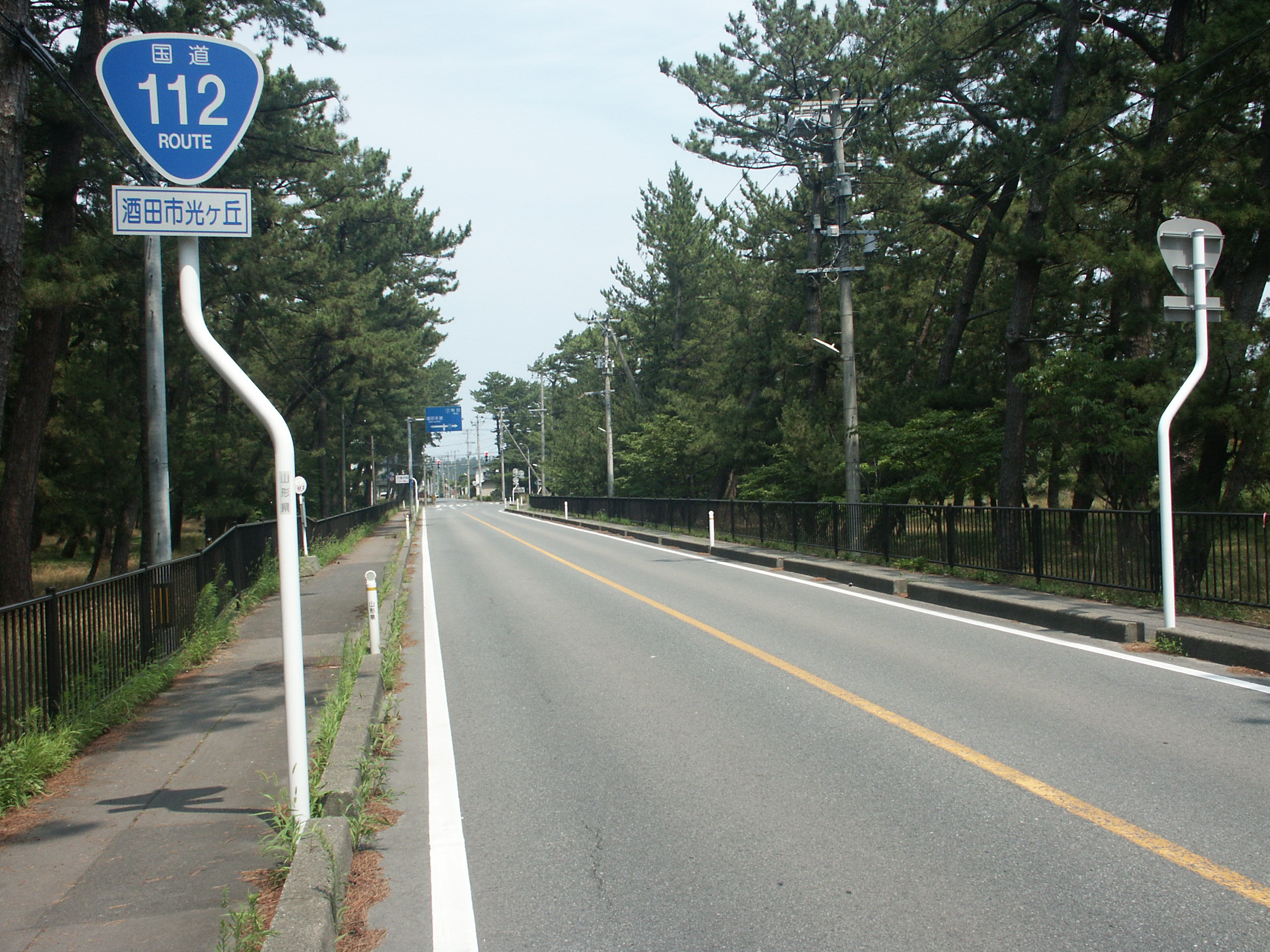 国道112号線山形県酒田市光が丘付近